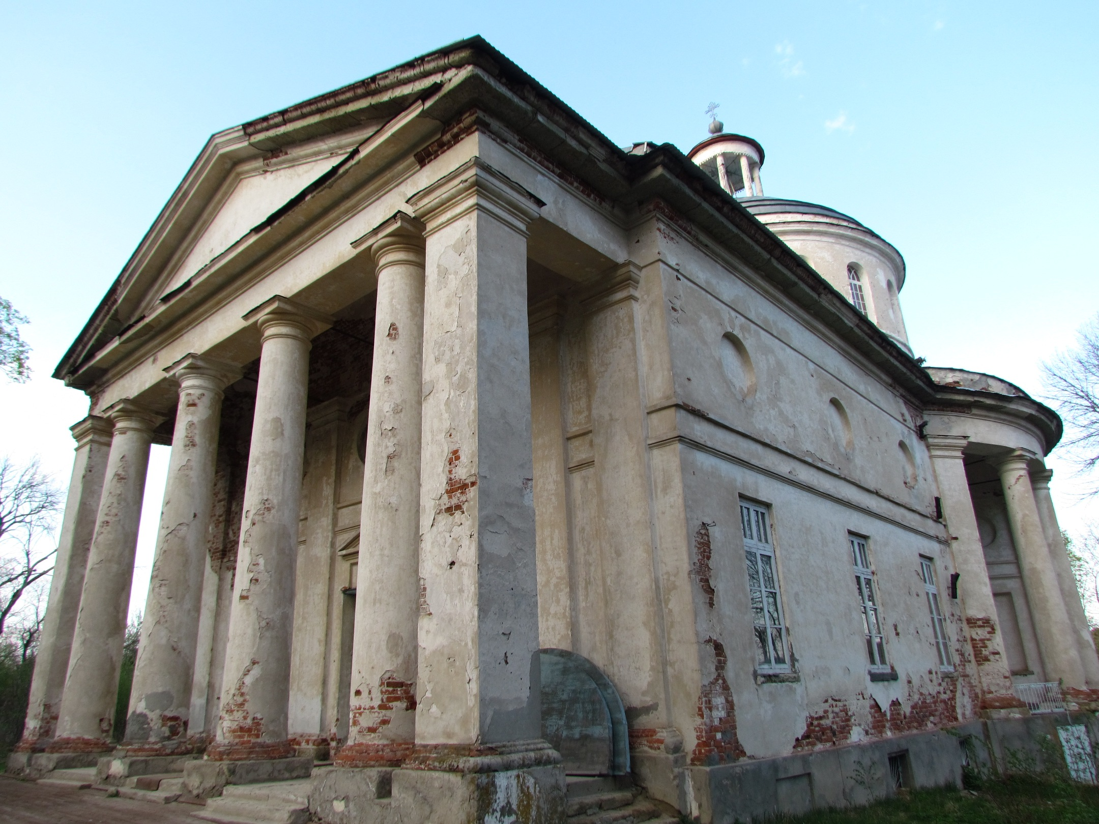 Transfiguration Church in Zubrilovka Estate (Tamala)